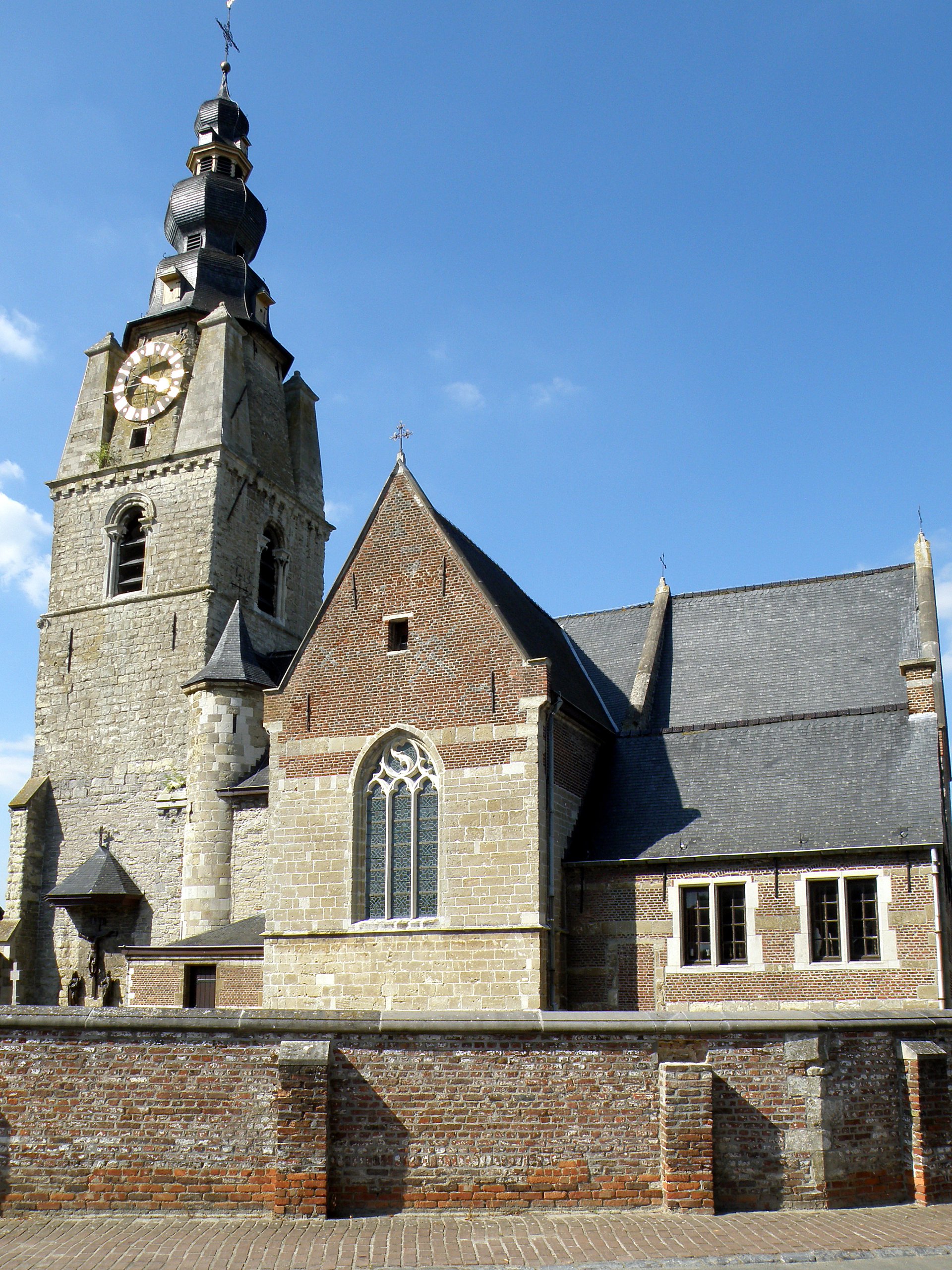 Mespelare, deelgem. van Dendermonde, Oost-Vlaanderen, België. Sint-Aldegondekerk.